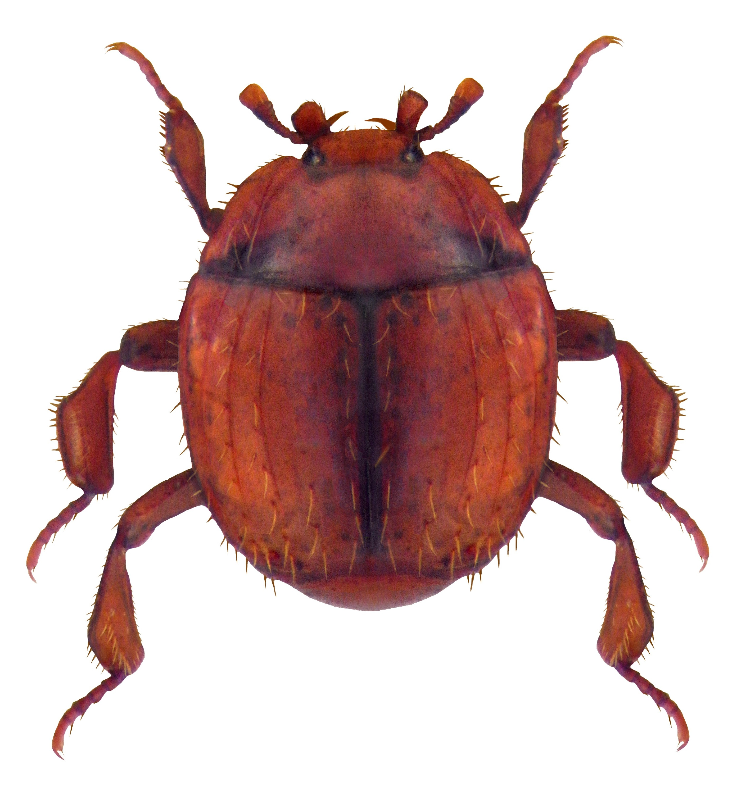 Familie: Histeridae Groesse: 1,5-2,0 mm Verbreitung: Europa Ökologie: myrmekophil Fundort: England Photo: U.Schmidt, 2010